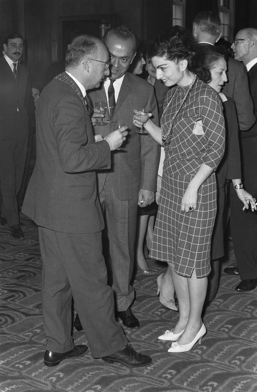 Georgier dansers bij B en W , links Van den Bergh (loco-burgemeester) en Miss Niznaradze (danseres), midden mr. Sukhishvilli.